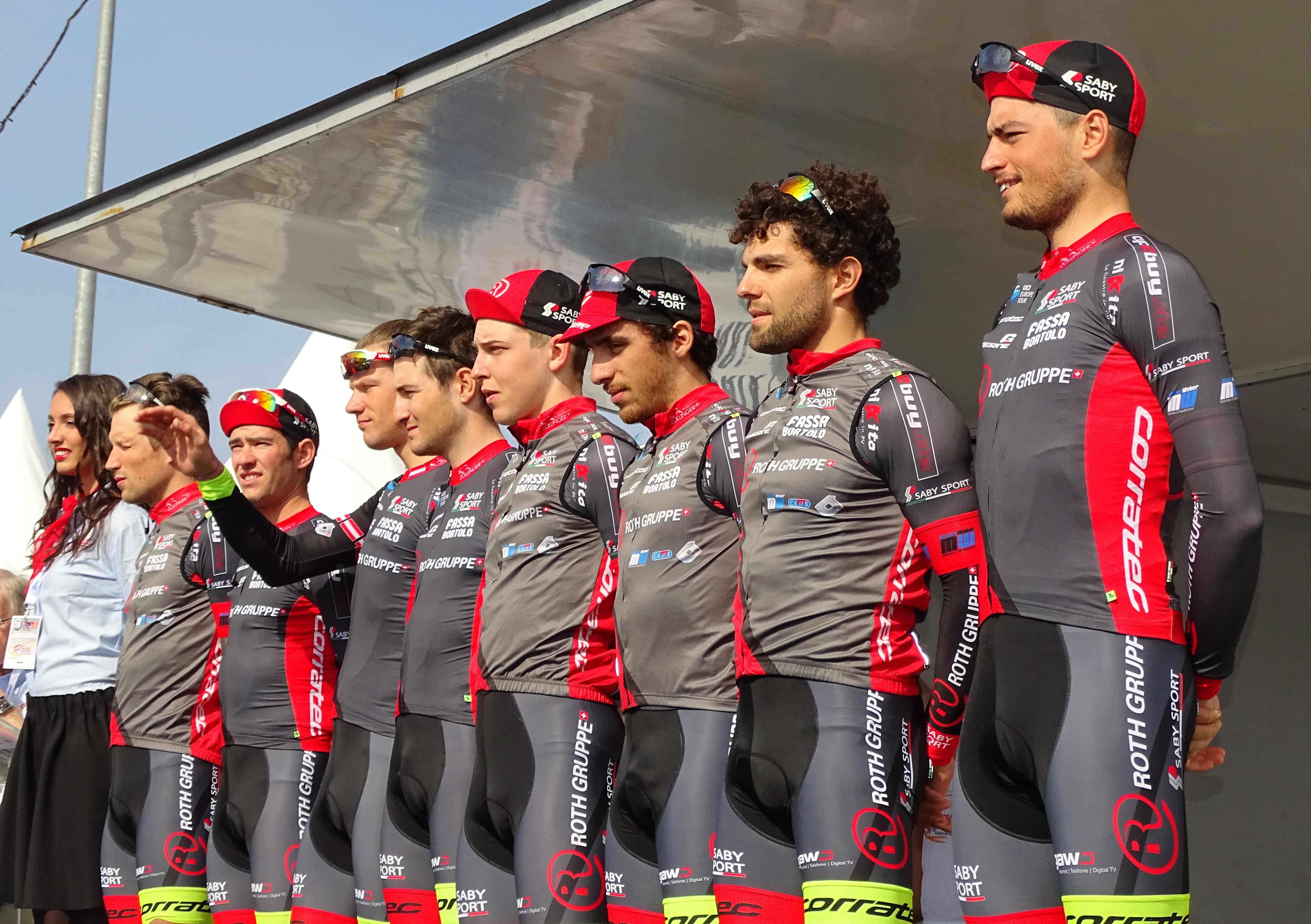 Reportage réalisé le jeudi 14 avril à l'occasion du départ et de l'arrivée du Grand Prix de Denain 2016 à Denain, Nord, Nord-Pas-de-Calais-Picardie, France.